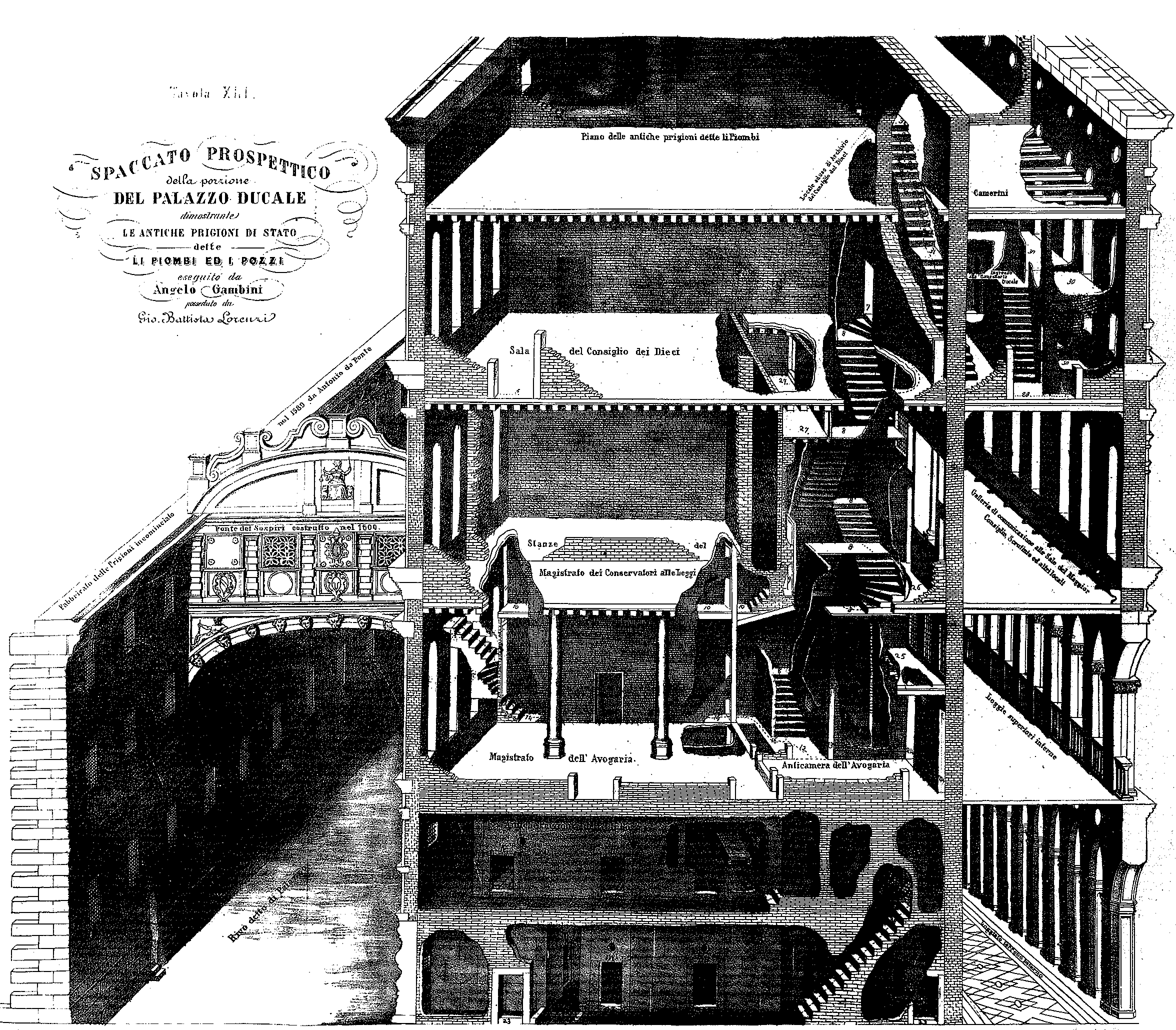 spaccato prospettico delle Prigioni del Palazzo Ducale di Venezia